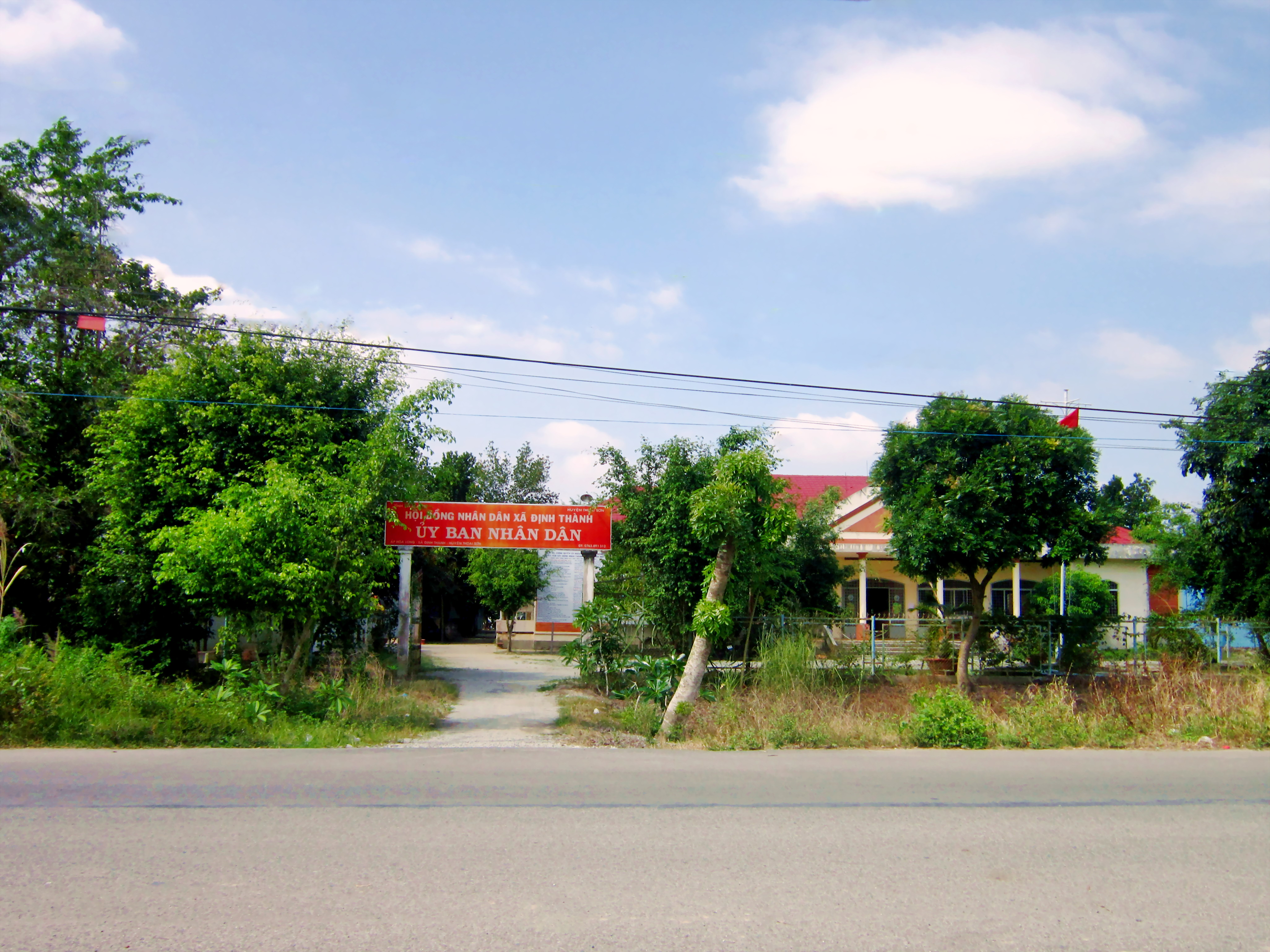 Ủy ban Nhân dân xã Định Thành, huyện Thoại Sơn, tỉnh An Giang, Việt Nam.